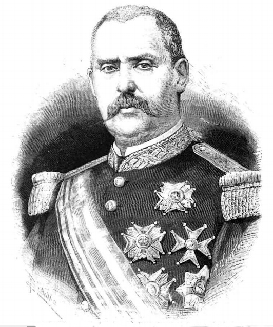 Retrato del general Antonio del Rey y Caballero, publicado en La ilustración española y americana, año XXX, n.º XXX1, 22 de agosto de 1886, página 100